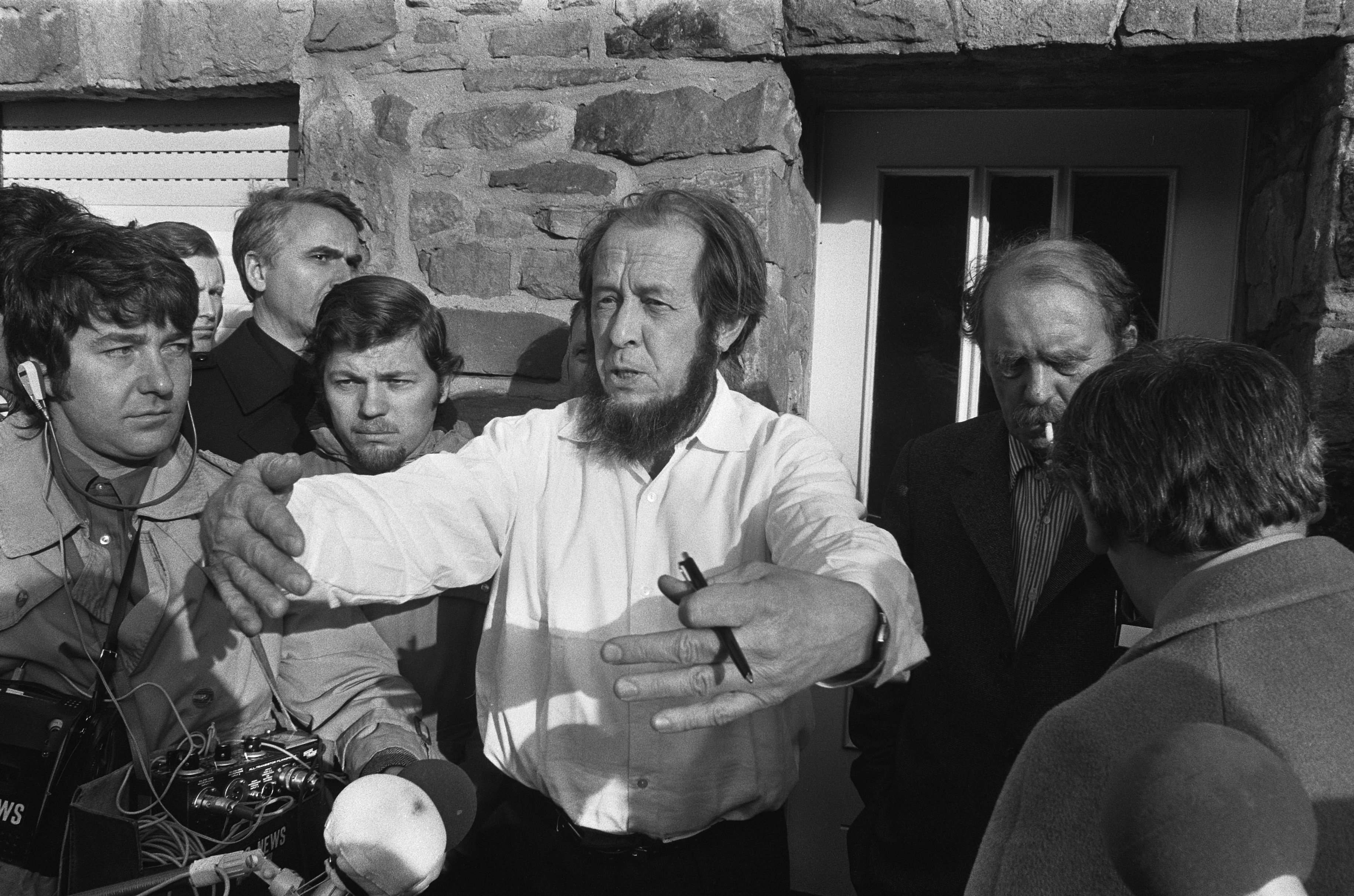 Collectie / Archief : Fotocollectie Anefo Reportage / Serie : De Russische schrijver Alexander Solzjenitsyn is uitgewezen uit Rusland en verblijft nu in het huis van Heinrich Böll Beschrijving : De schrijver staat de pers te woord, rechts naast hem Heinrich Böll Datum : 14 februari 1974 Locatie : Duitsland, Keulen Trefwoorden : pers, schrijvers Persoonsnaam : Böll, Heinrich, Solzjenitsyn, Alexander Fotograaf : Bert Verhoeff / Anefo Auteursrechthebbende : Nationaal Archief Materiaalsoort : Negatief (zwart/wit) Nummer archiefinventaris : bekijk toegang 2.24.01.05 Bestanddeelnummer : 927-0020